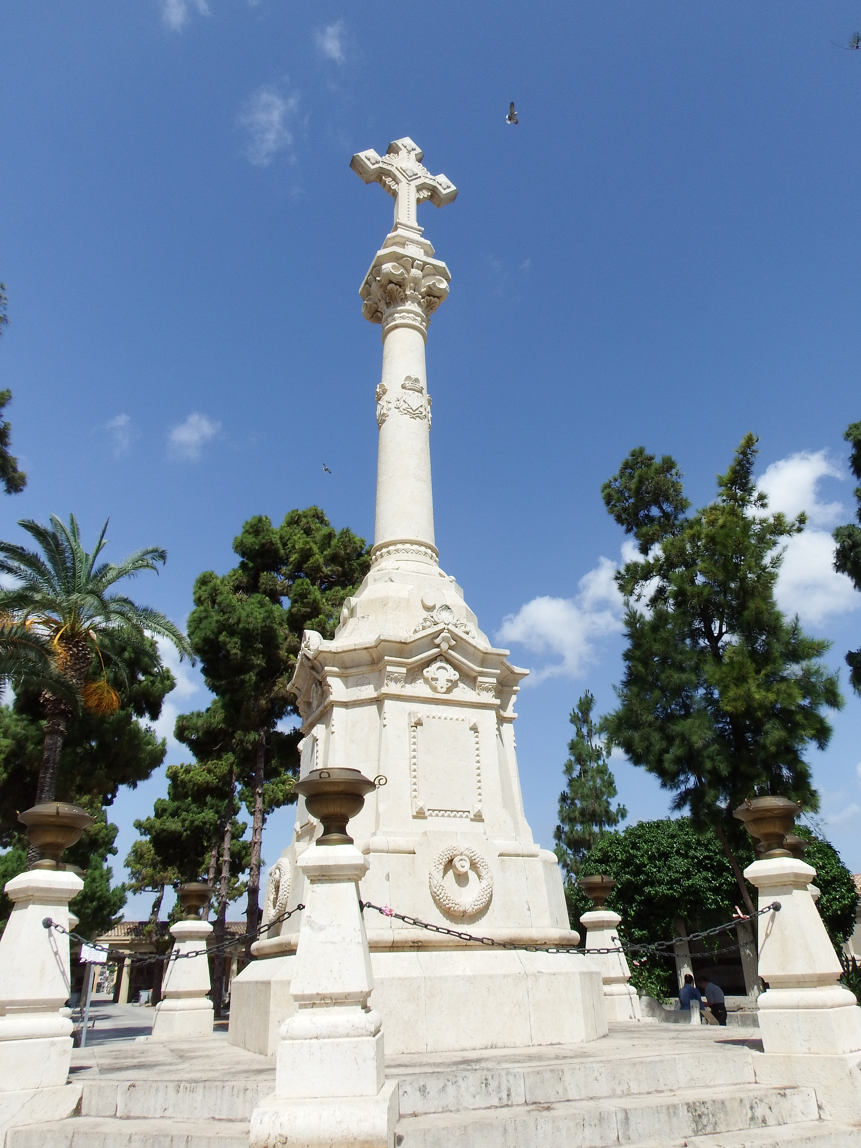 Cruz que marca la fosa de los fallecidos en epidemias de cólera